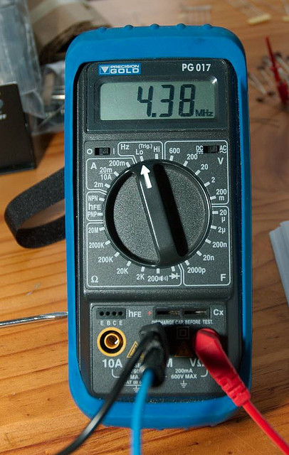 Máy đo điện , amp, ohm và tần số